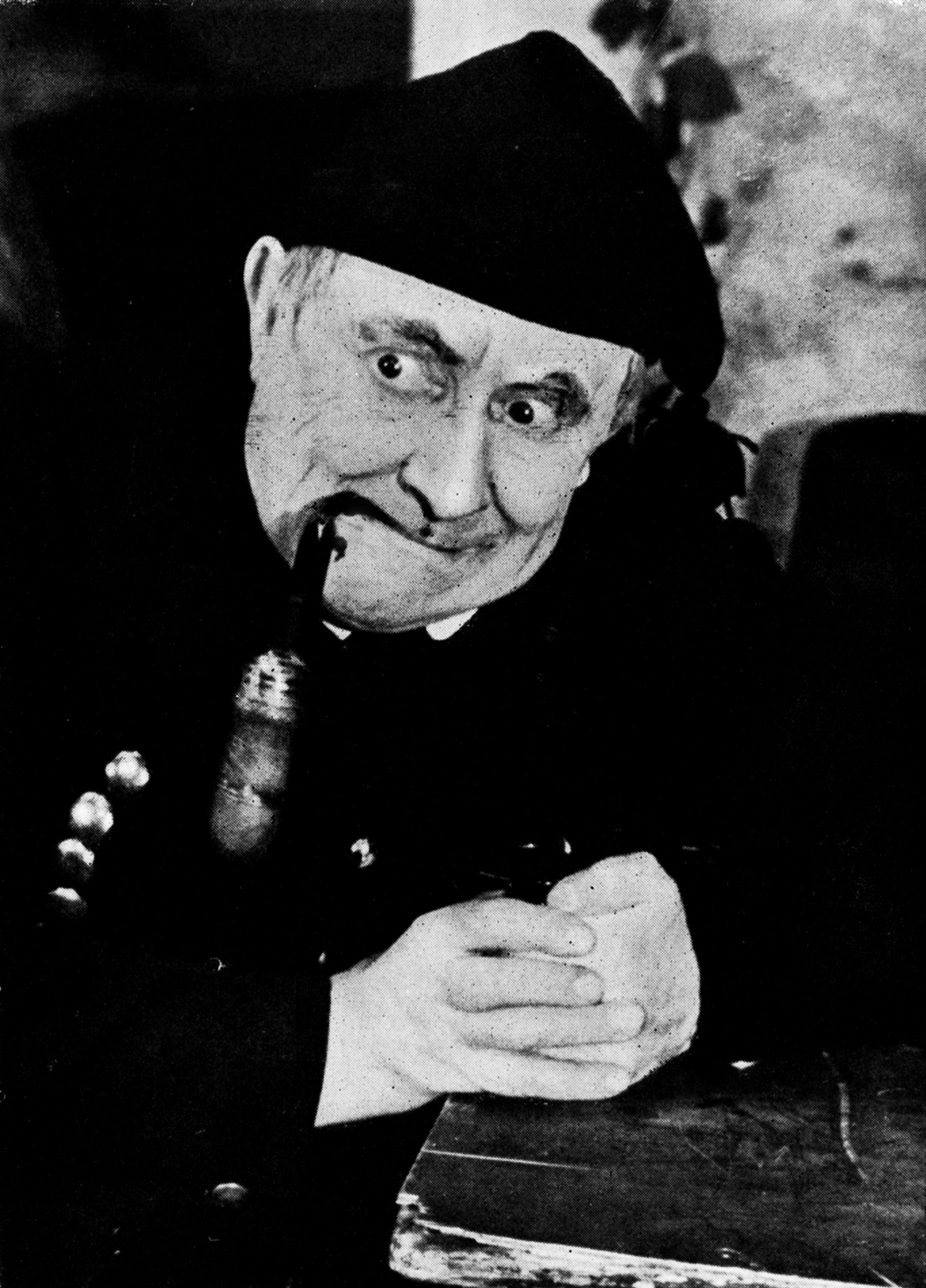 Der beliebte Schauspieler des Altonaer Stadttheaters/Deutsches Volkstheaters Hamburg-Altona, Hanns Fischer, auf einem Portraitfoto aus der Inszenierung "Der G’wissenswurm"